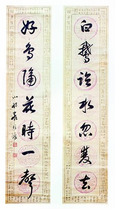 [清] 严信厚 书法 七言对 墨 来自：清代严信厚的书法 原作为二维平面艺术（古代书法作品），作者逝世已逾百年，无特殊版权要求。